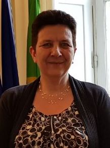 Frédérique Vidal, Ministre française de l'Enseignement supérieur, de la Recherche et de l'Innovation et Gilberto Kassab, Ministre brésilien de la Science, de la Technologie, de l'Innovation et des Communications